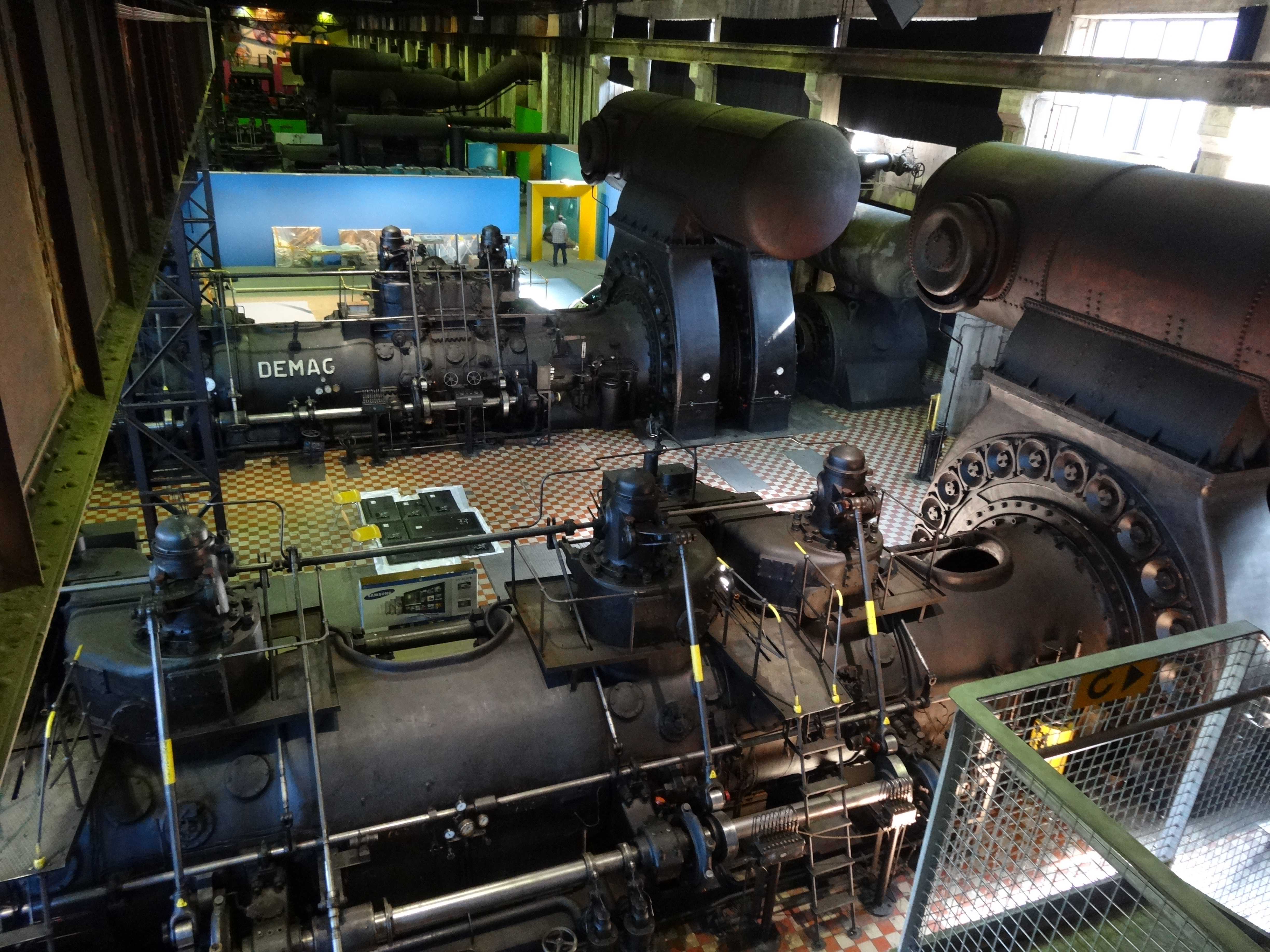 Völklinger Hütte 113